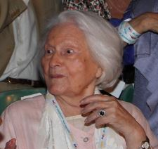 ליה ון ליר בפסטיבל הסרטים ירושלים, 2012